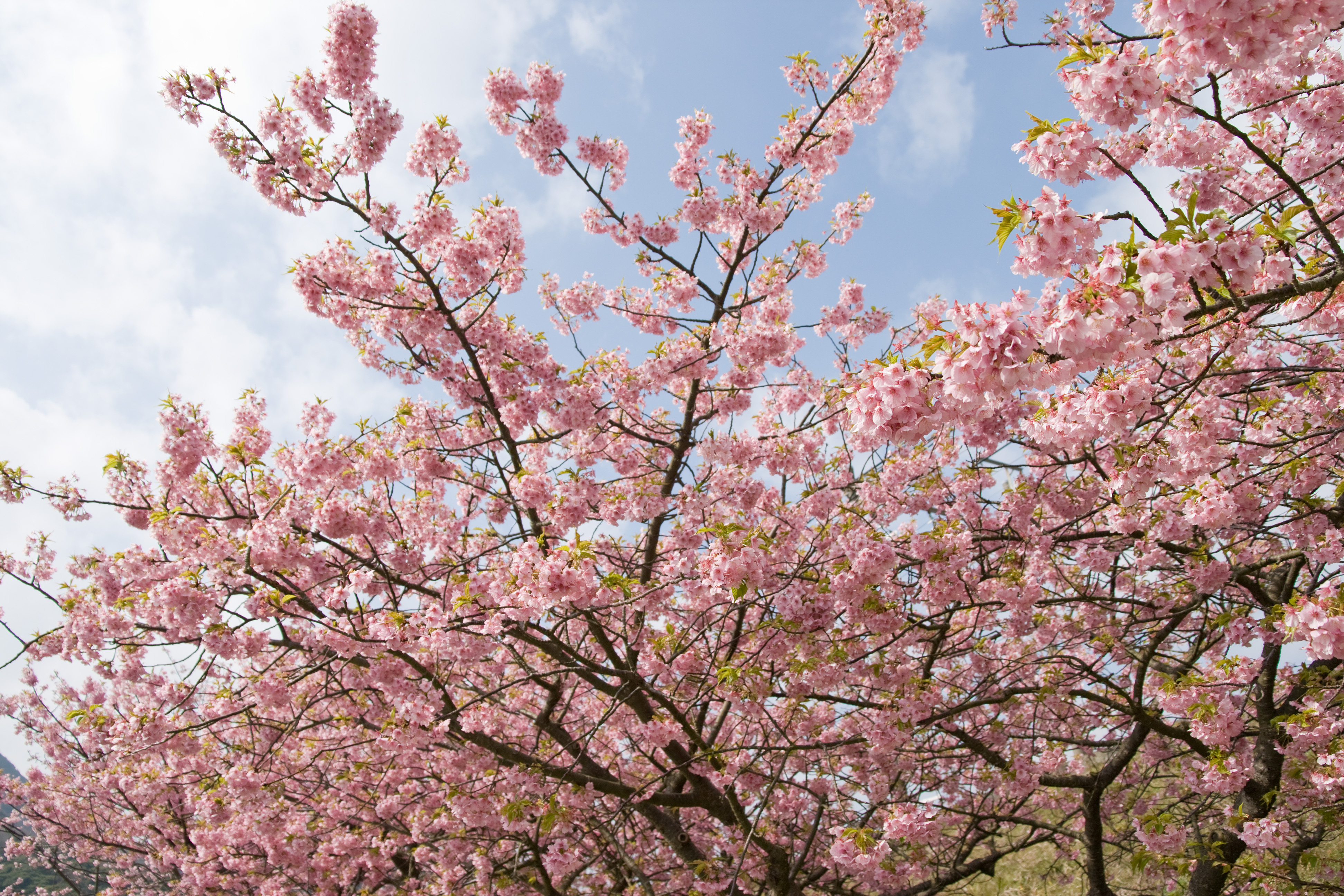 カワヅザクラ (学名:Prunus lannesiana cv. Kawazu-zakura)